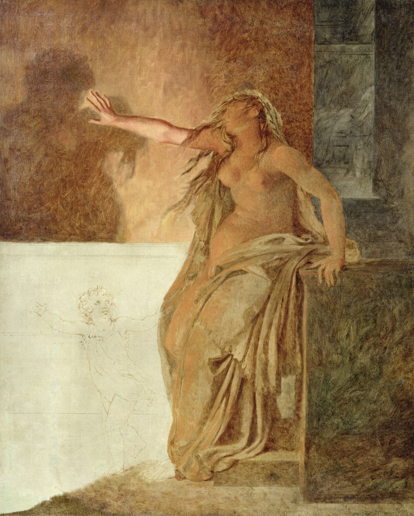 Pierre-Narcisse Guérin, La Jalousie 1802 étude à l'huile musée des Beaux-arts d'Angers